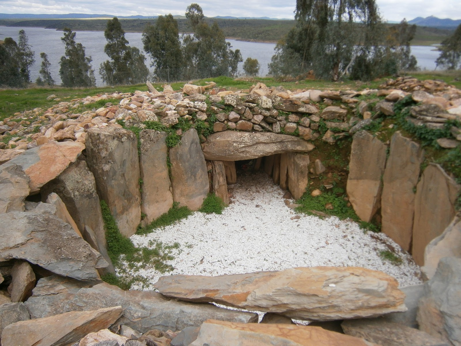 Dolmen en la comarca de la Siberia